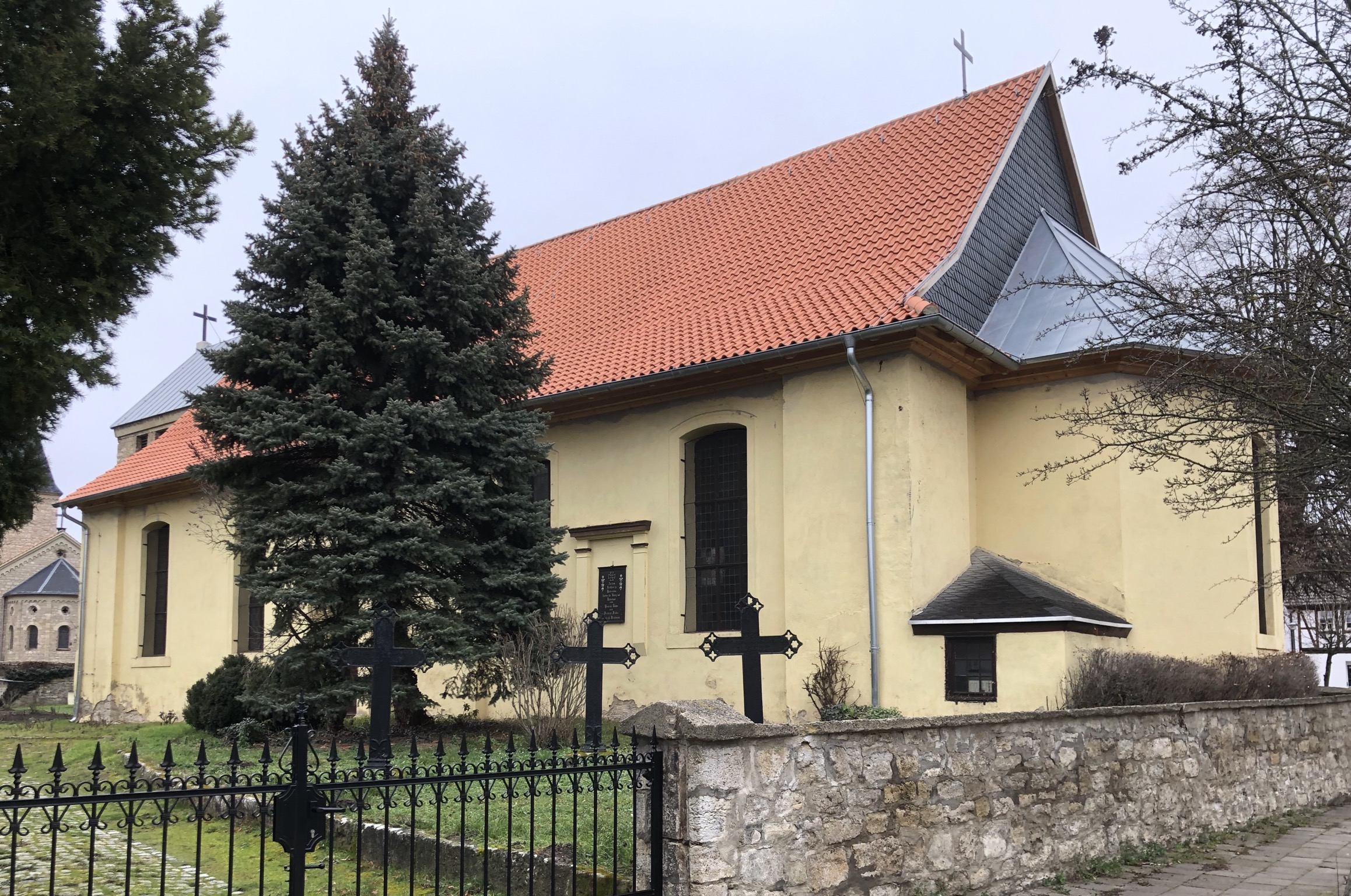 Kirche in Hedersleben evangelisch